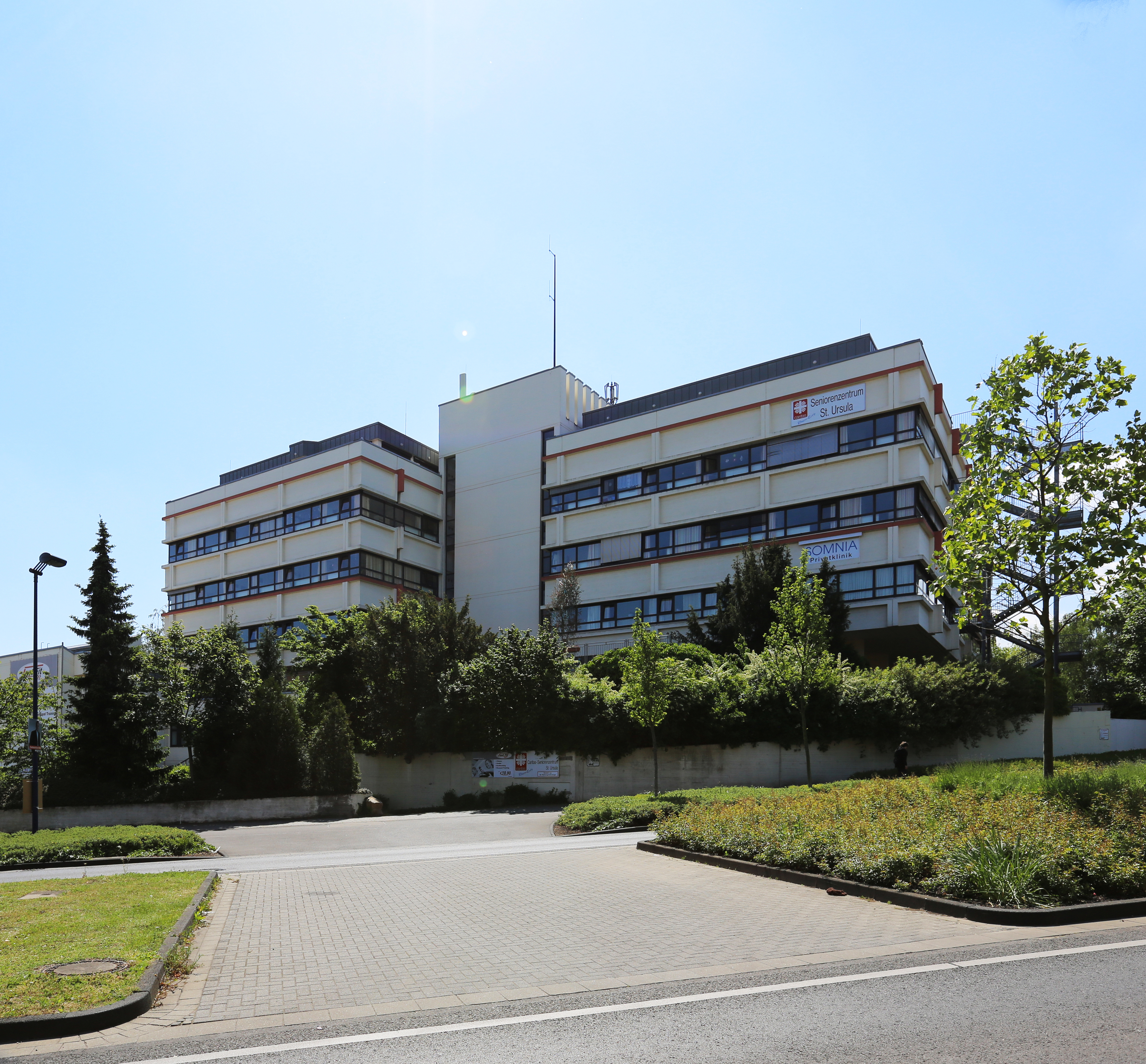 Somnia Klinik Hürth, Friedrich-Ebert-Straße 11a. Die Somnia-Klinik Ein Privat – Krankenhaus, spezialisiert für Psychiatrie, Psychotherapie und Psychosomatik